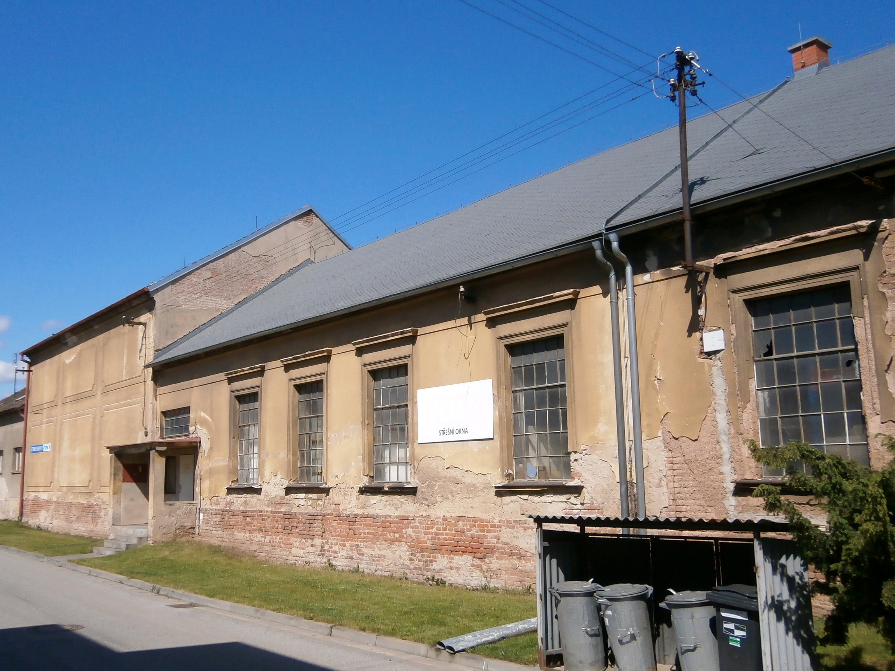 Budovy areálu bývalých ústředních jatek v Hradci Králové